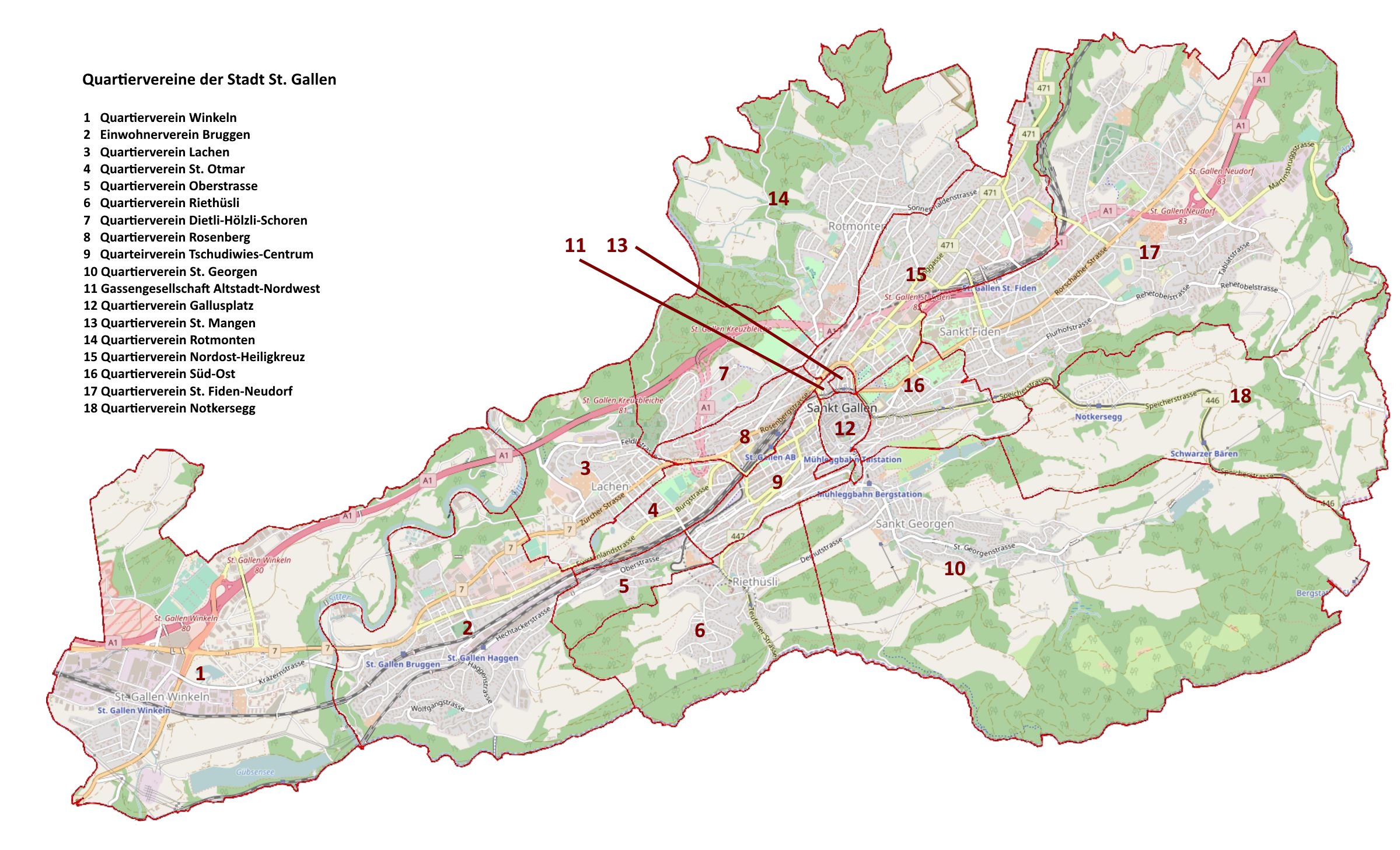 Karte der Stadt St. Gallen mit den Grenzen der Quartiere der Quartiervereine inklusive Legende